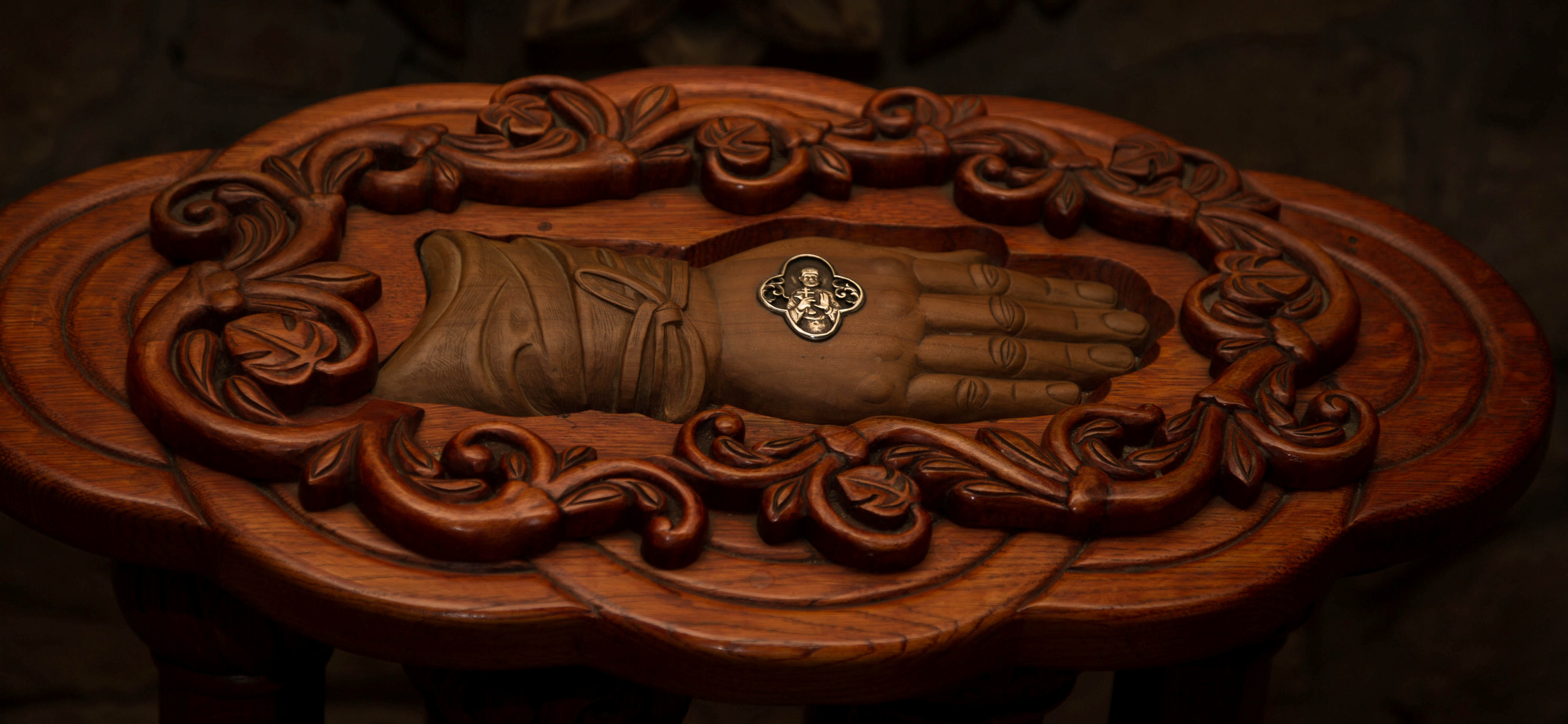 Рука святого сповідника Арсена Річинського, що знаходиться в Церкві Різдва Христового.